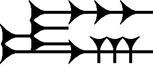 Cuneiform sign